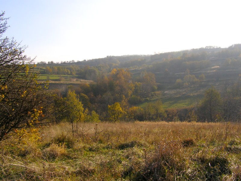 Okolice wsi Draganowa